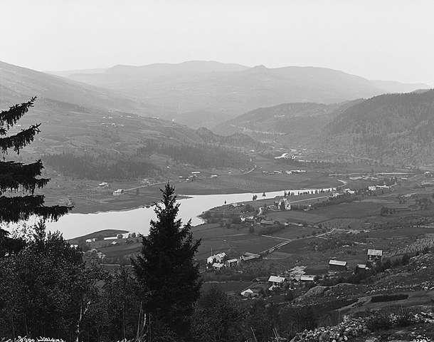 Fra Breidablikk mot Bagn